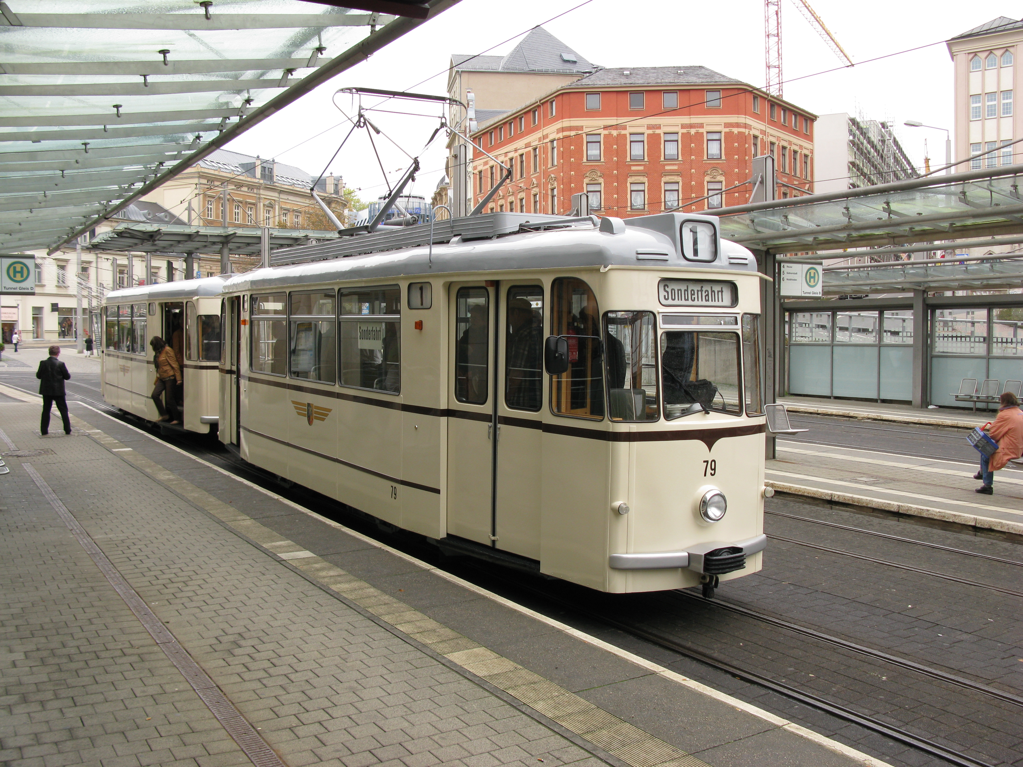 Plauener Straßenbahn: Historische Gothawagen (Triebwagen 79 und Beiwagen 28) an der zentralen Haltestelle "Tunnel"